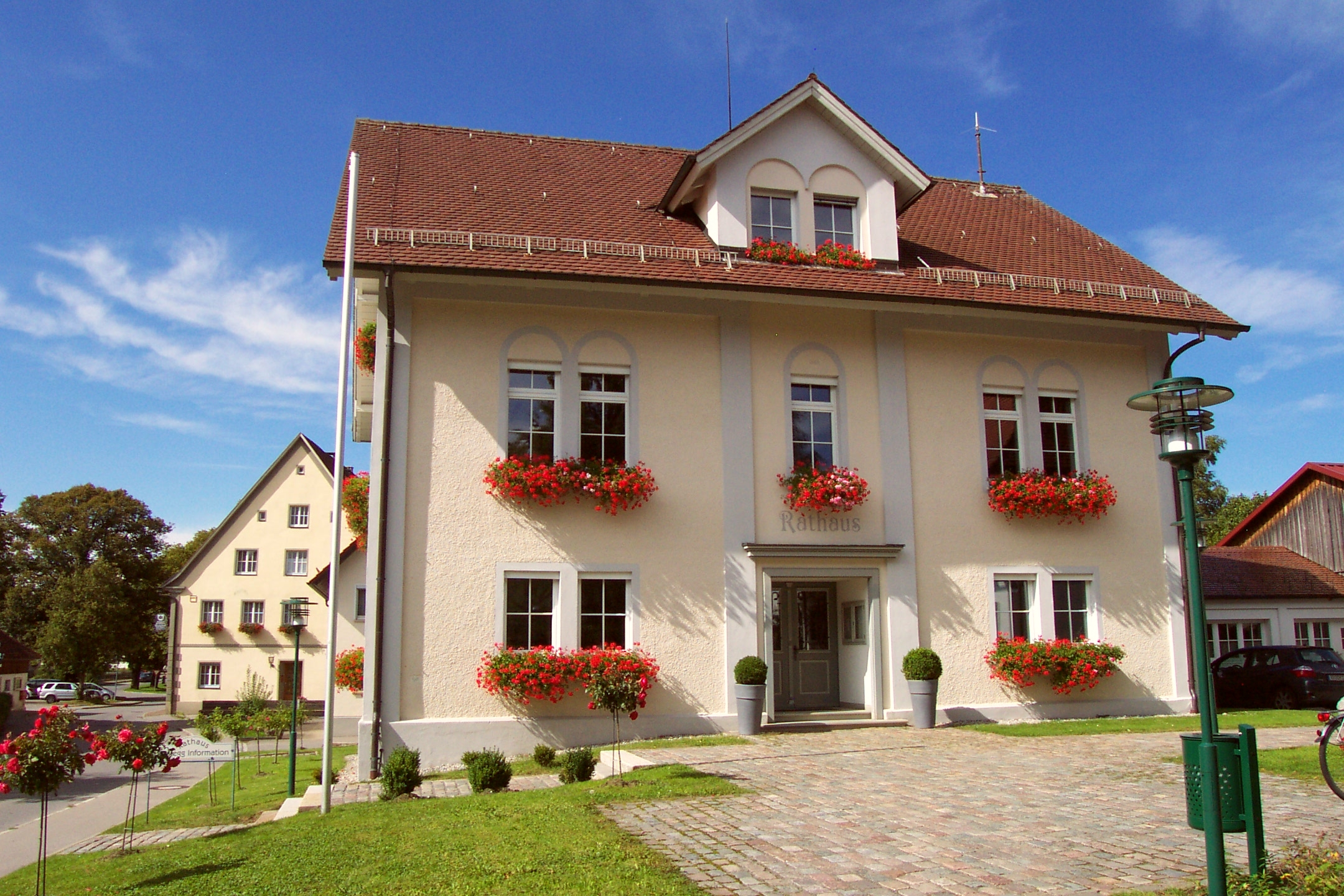 Wolfegger Rathaus